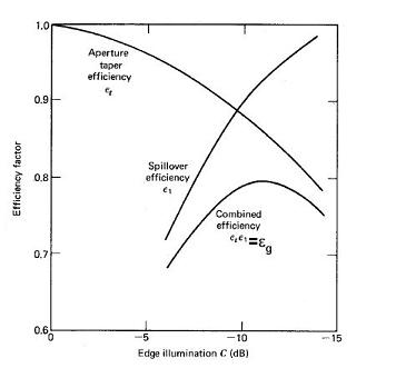 Grafica de la combinación entre la eficiencia Spillover y la eficiencia Iluminación.